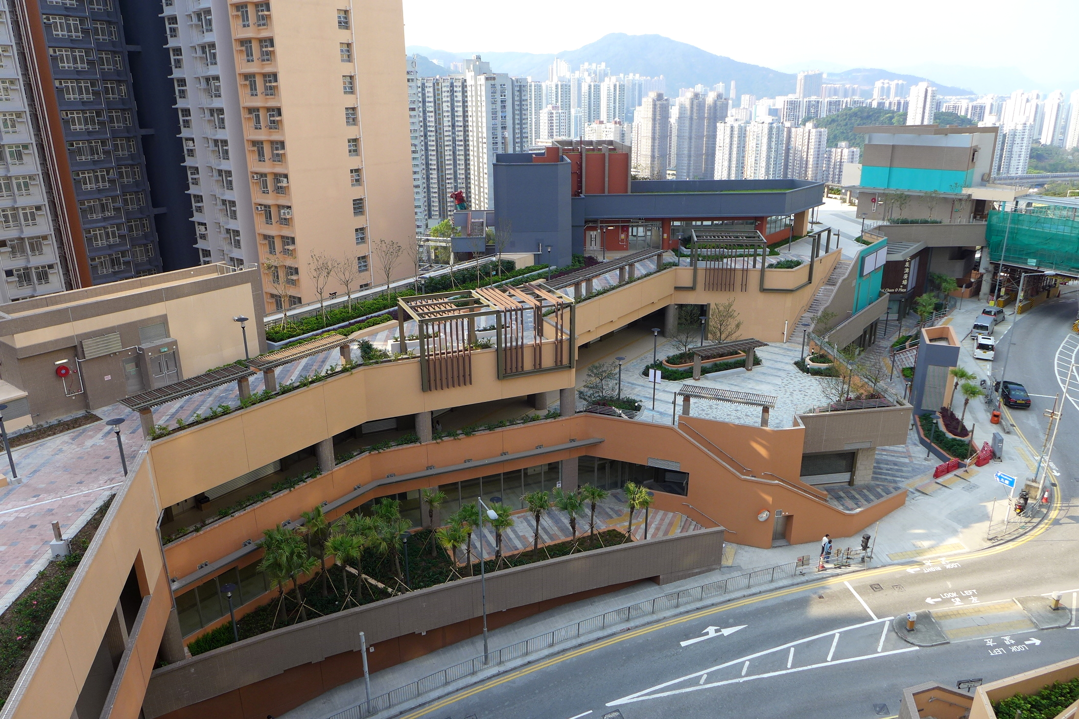 Shui Chuen O Plaza